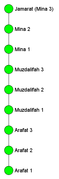 Metro Mecca Line Layout